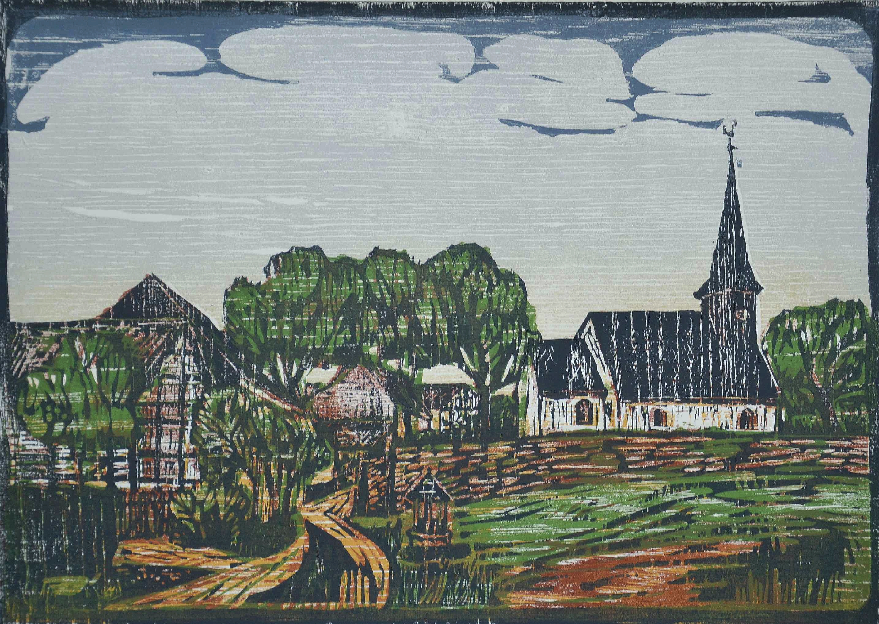 Conrad-Peter Joist, Laurentiuskapelle u. -brunnen in Niederkastenholz, Holzschnitt